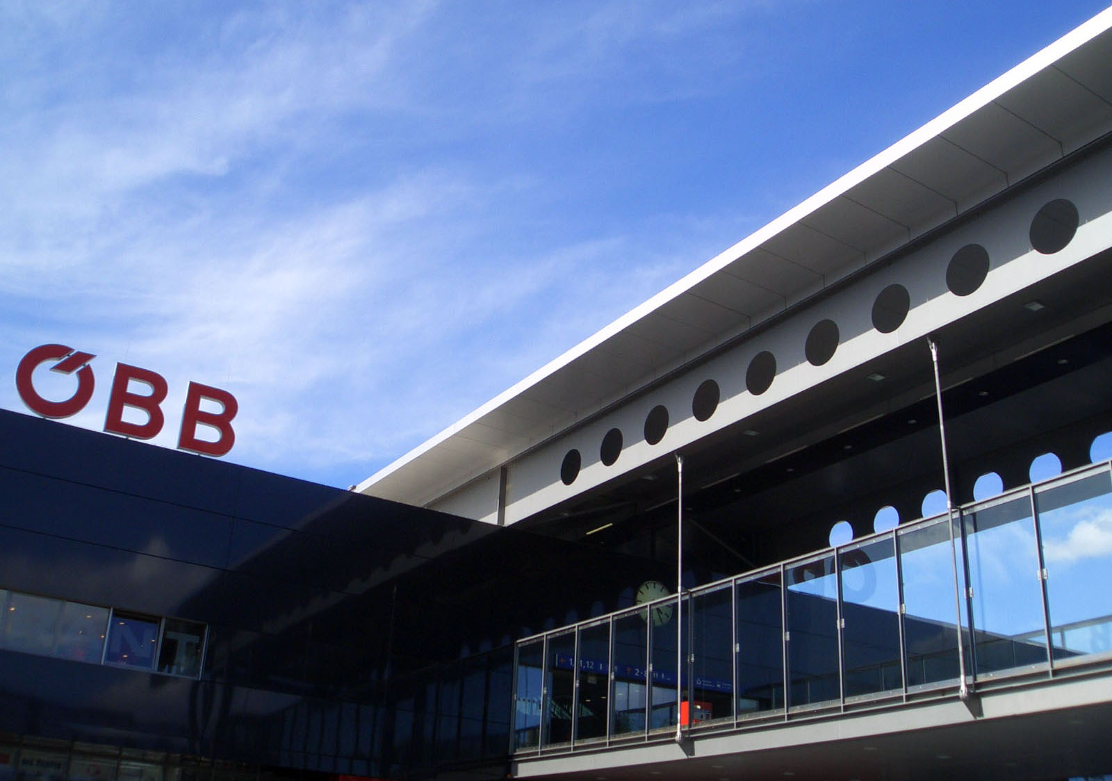 Welser Hauptbahnhof